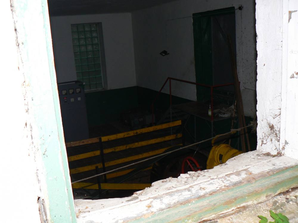 Saesaare hüdroelektrijaama masinasaal.